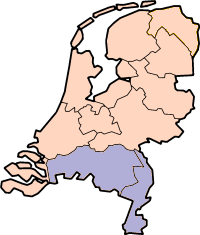 Locatiekaart van NUTS4: Zuid-Nederland.